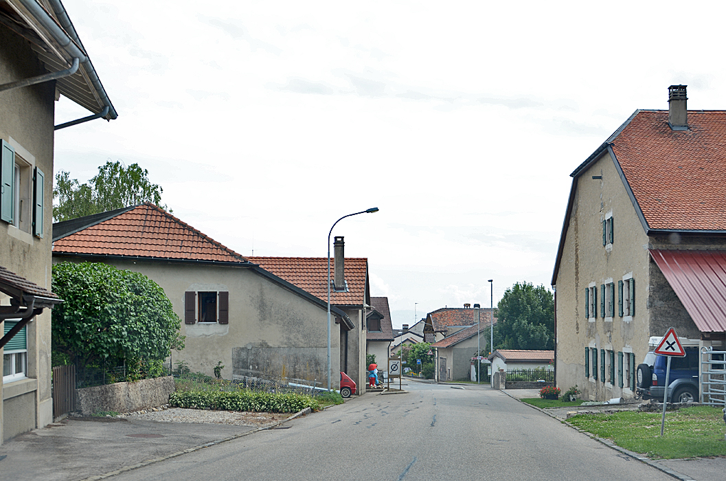 Dorfzentrum von Bassins VD